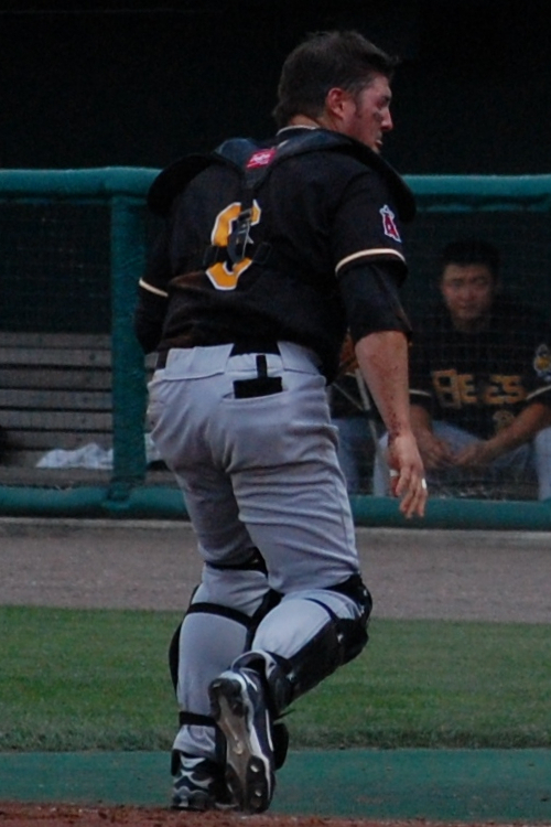 Ryan Budde